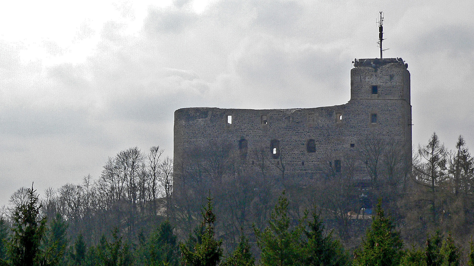 Hrad Radyně / Castle Radyně